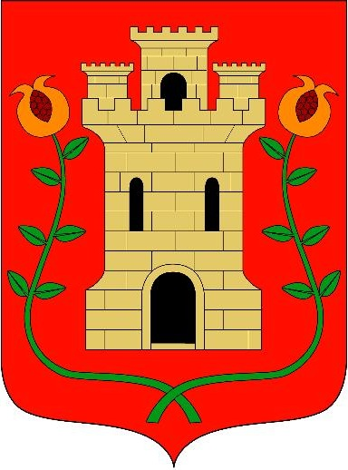 Armas de Azcoitia